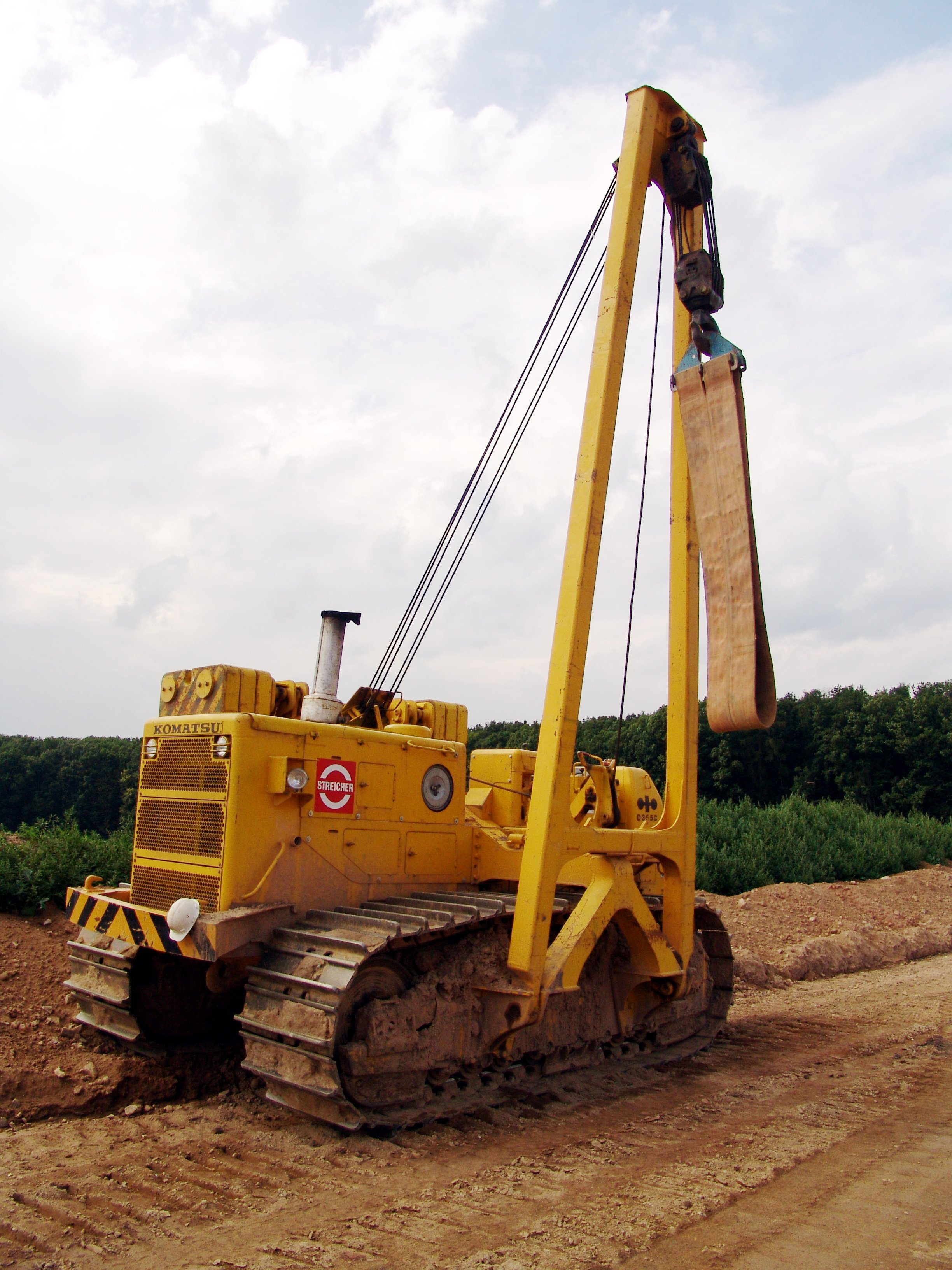 Komatsu Raupenkran